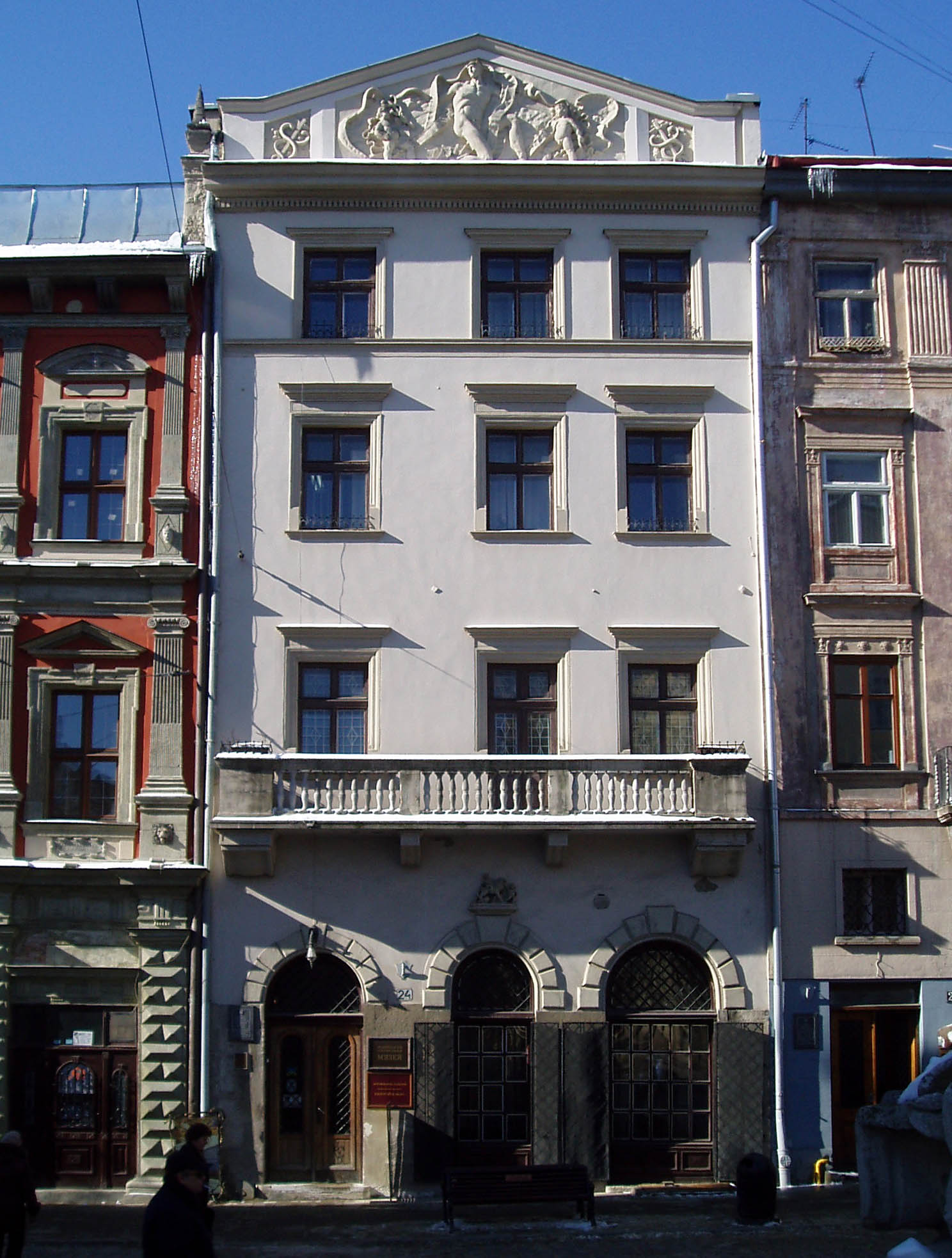 Будинок № 24 на Площі Ринок у Львові